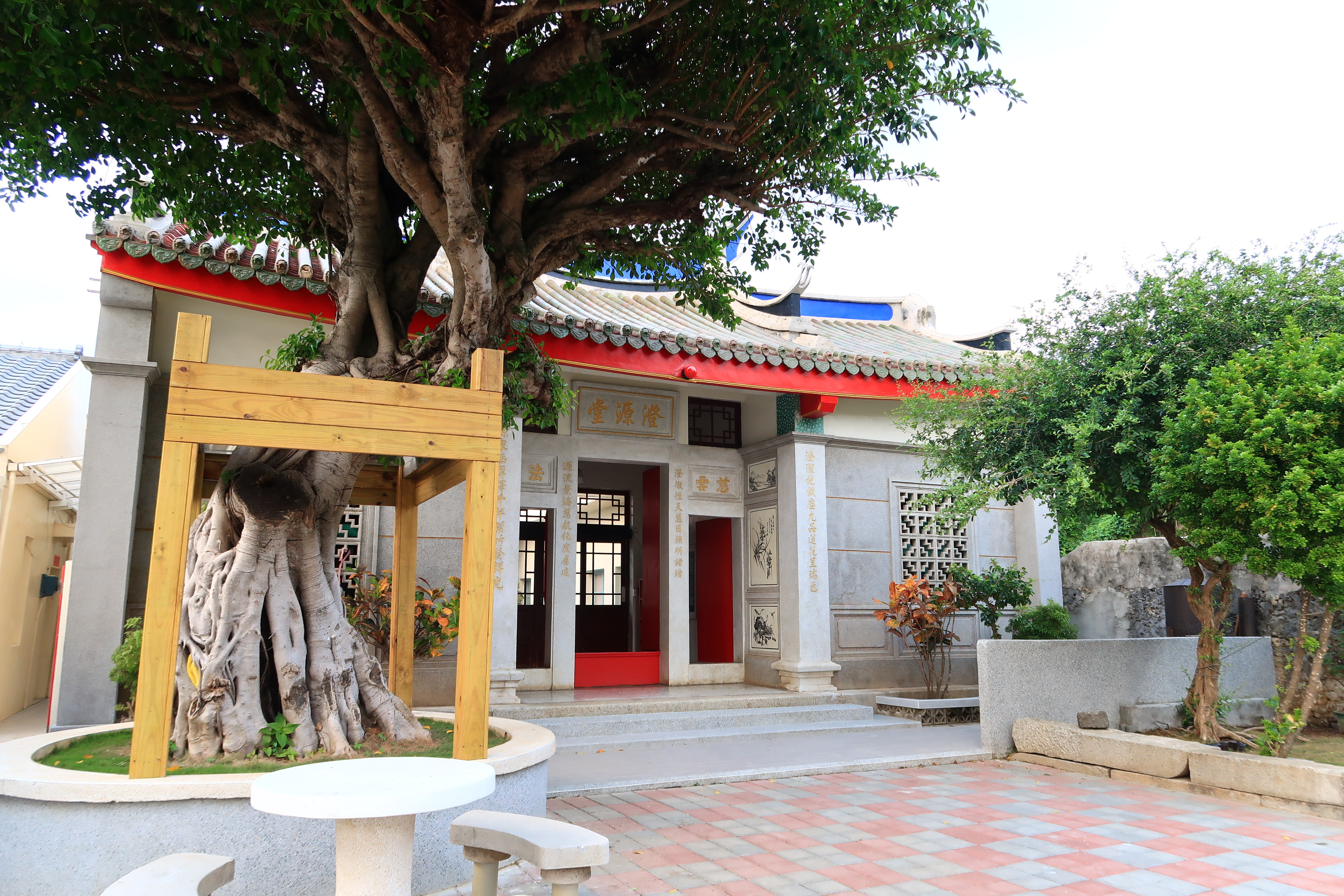 澄源堂2020起建的涼亭與庭園